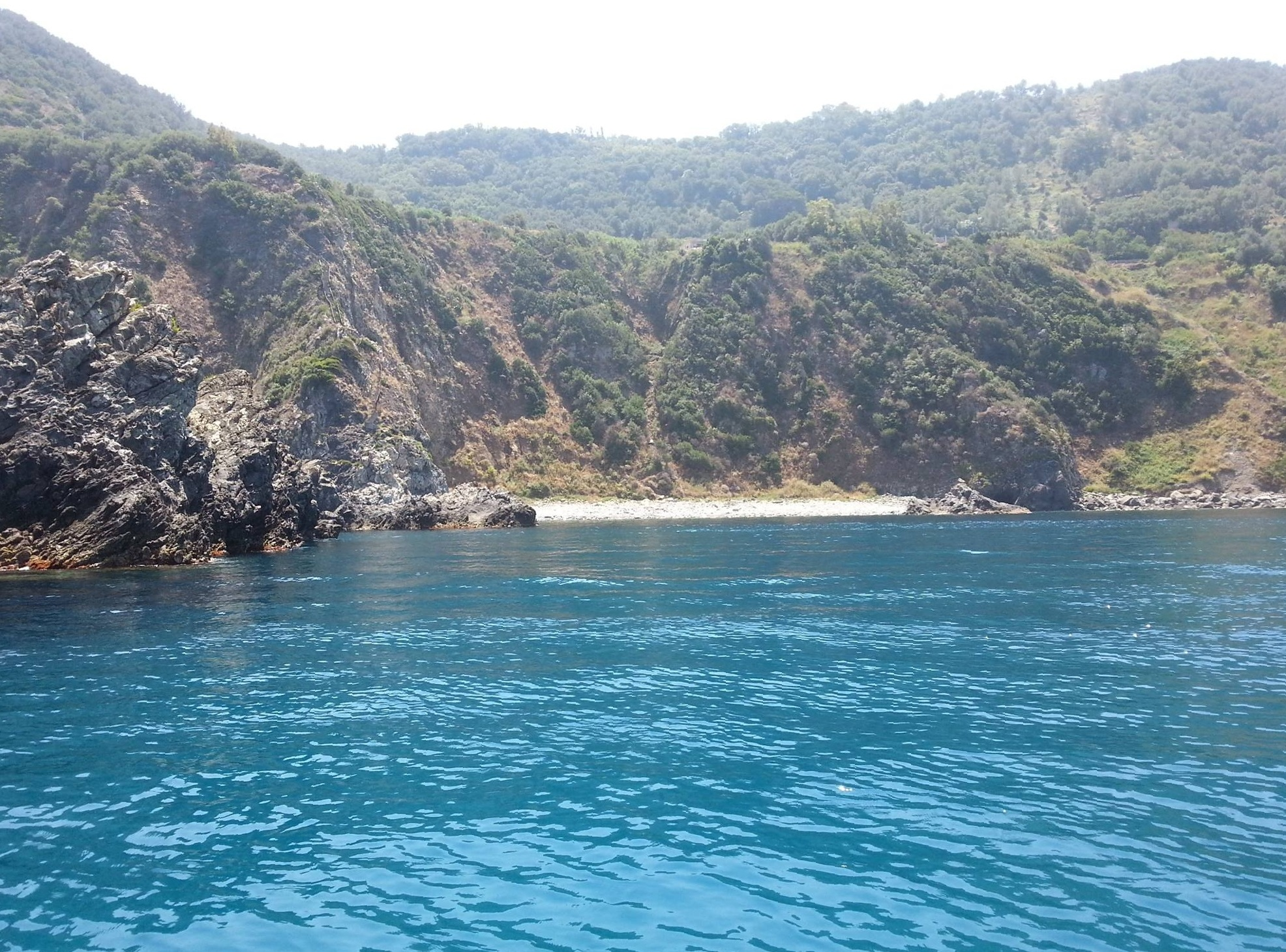 Spiaggia antistante lo scoglio di Trachini a Palmi